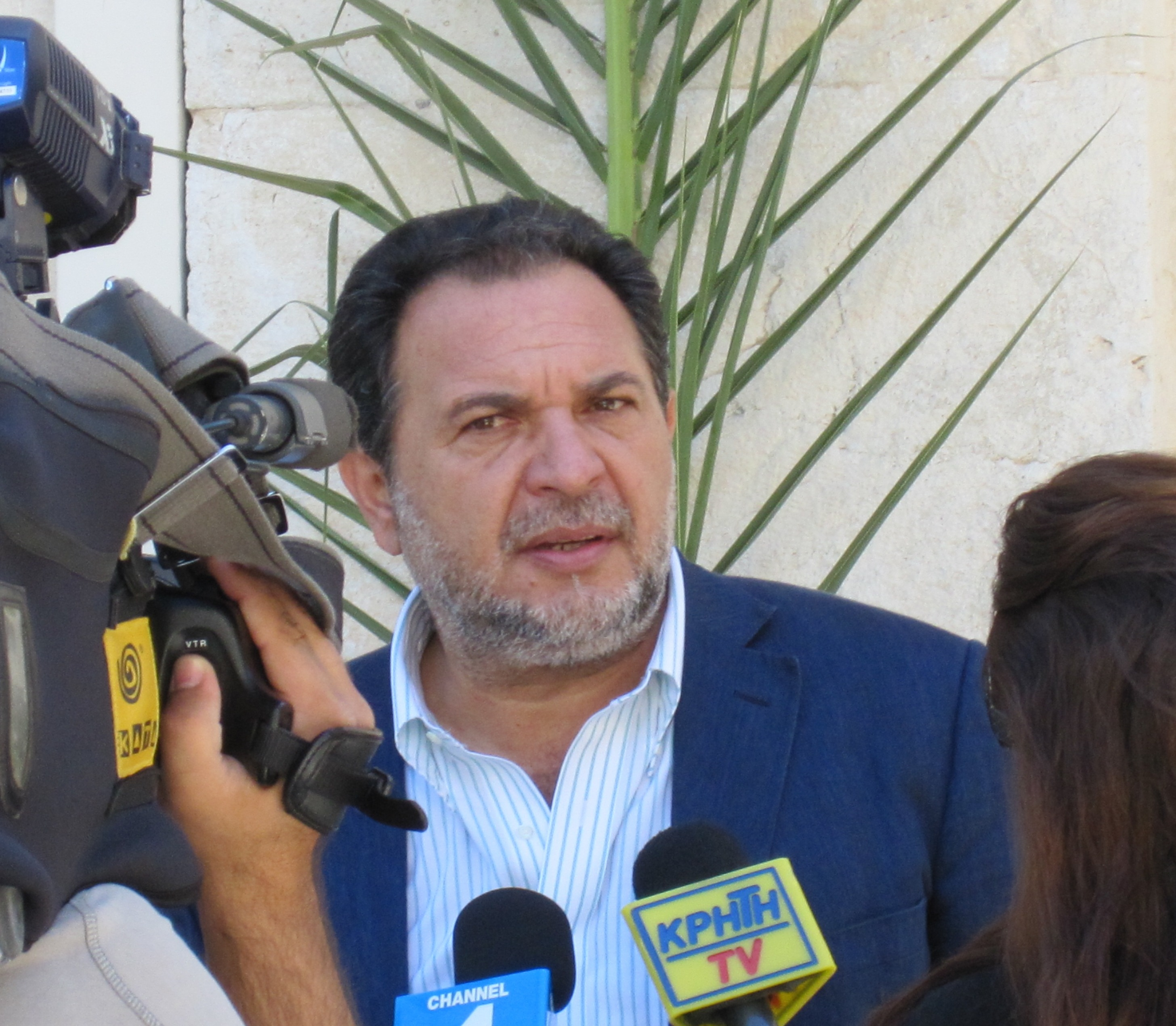 Γιάννης Κουράκης, Έλληνας πολιτικός